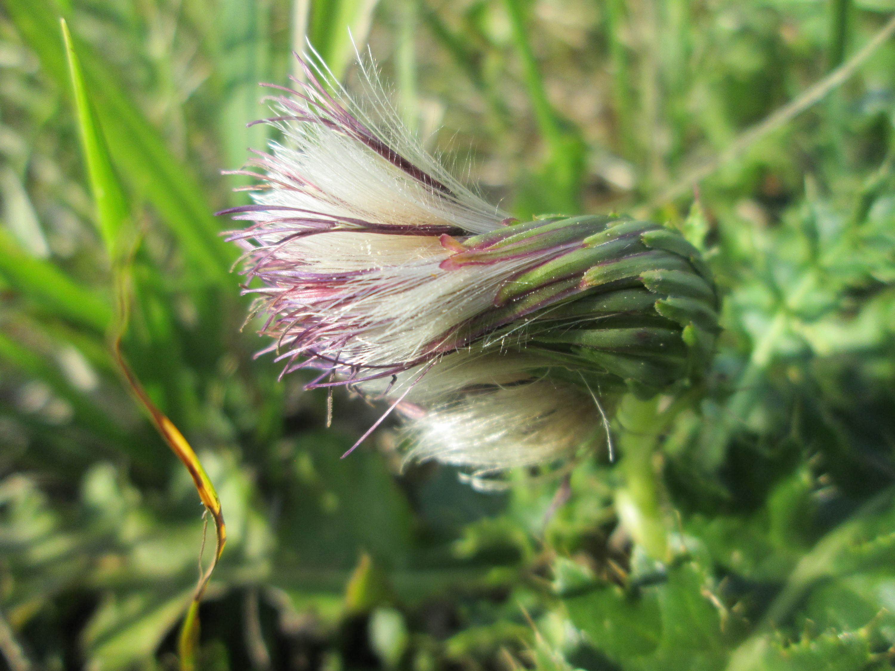 Stängellose Kratzdistel (Cirsium acaule) im Naturschutzgebiet Birzberg